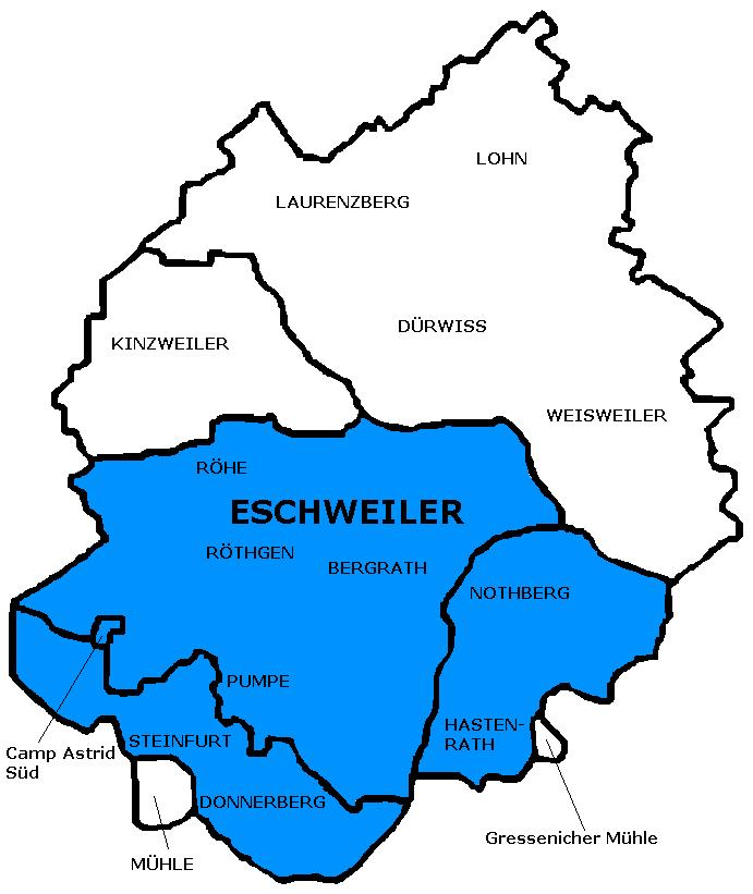 Ewentwicklung1932